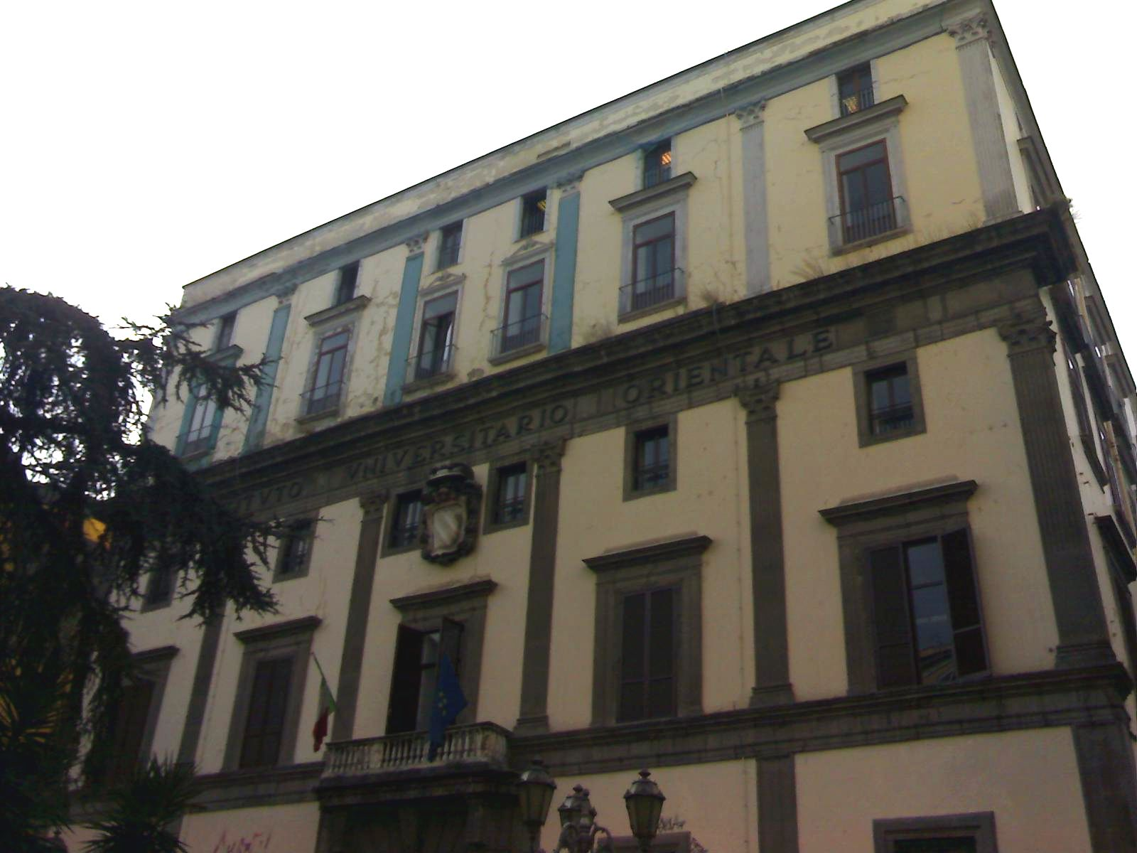 Palazzo Giusso (Napoli)